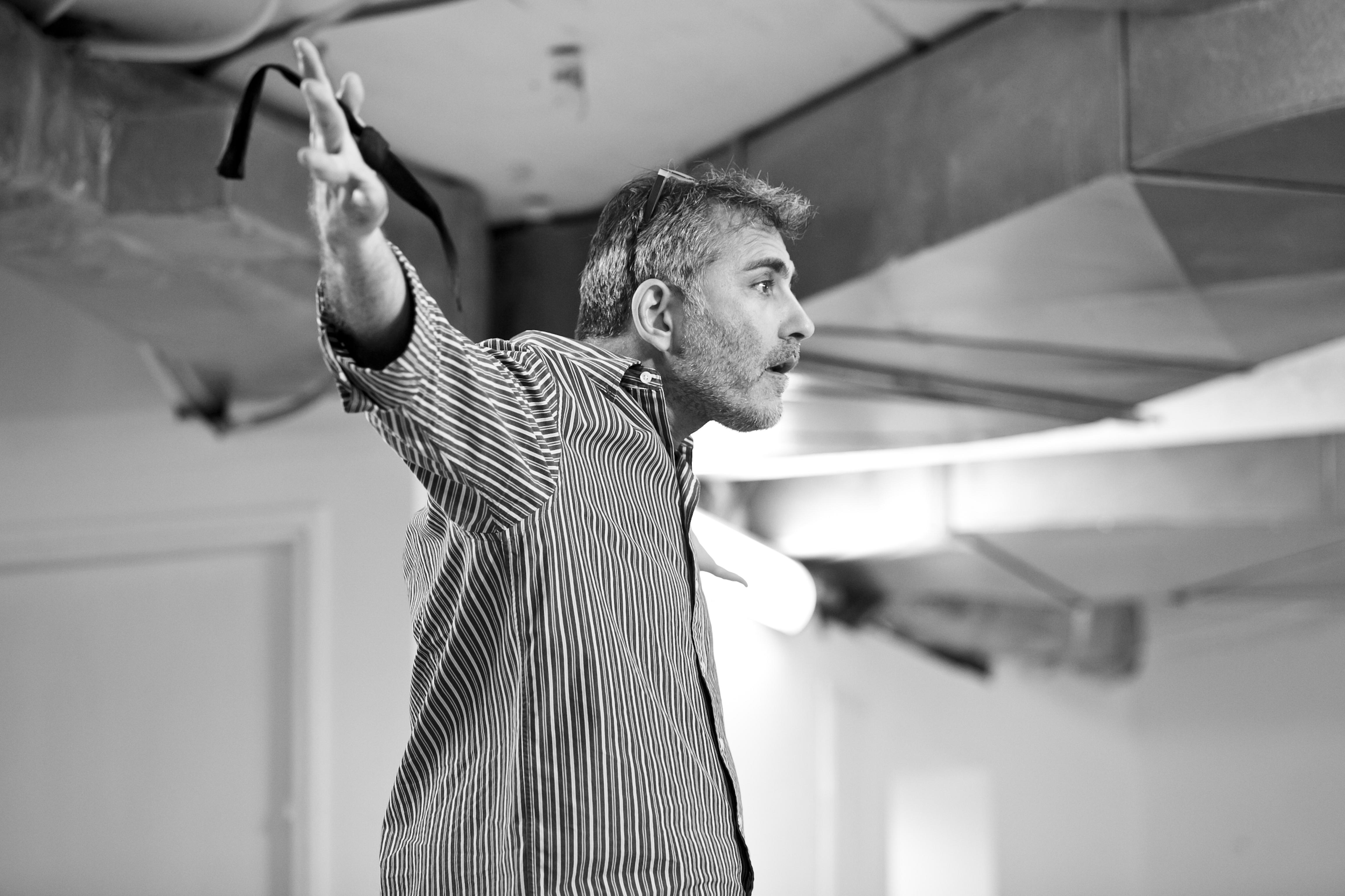 רפי ניב בחזרות להצגה קומפני